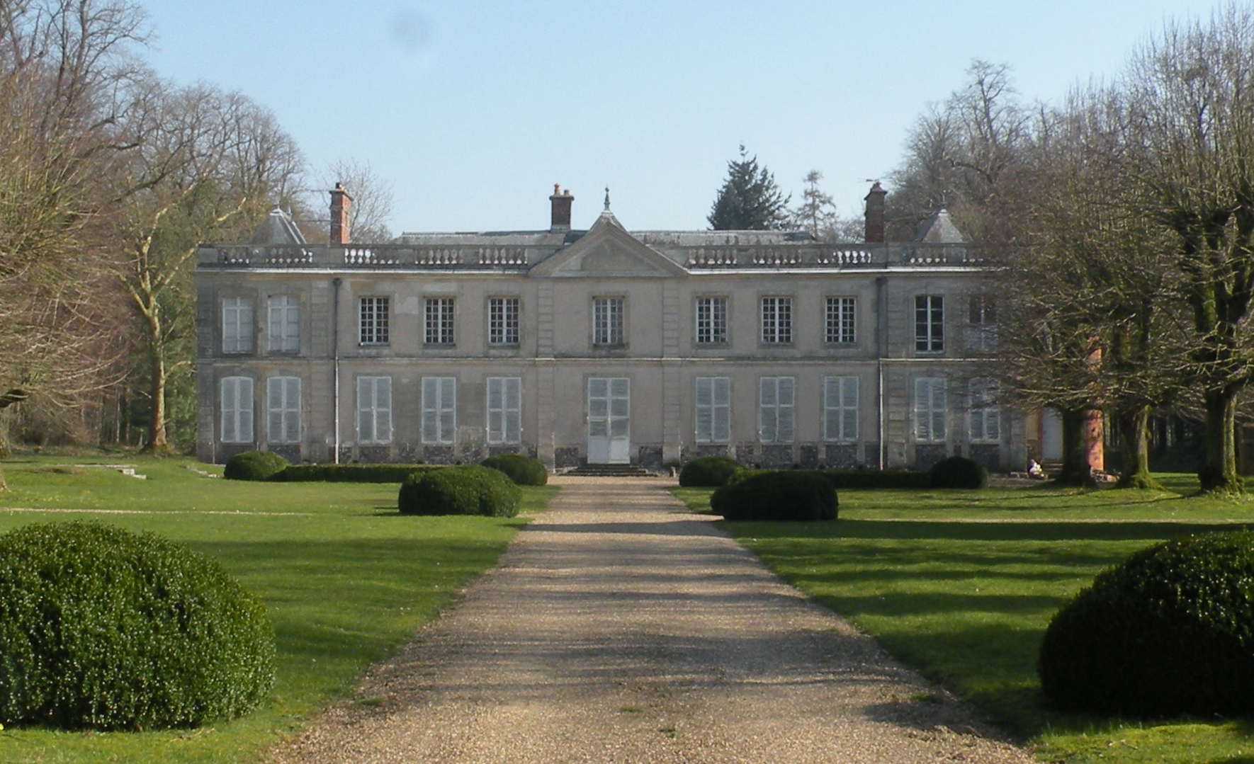 Château de Villotran